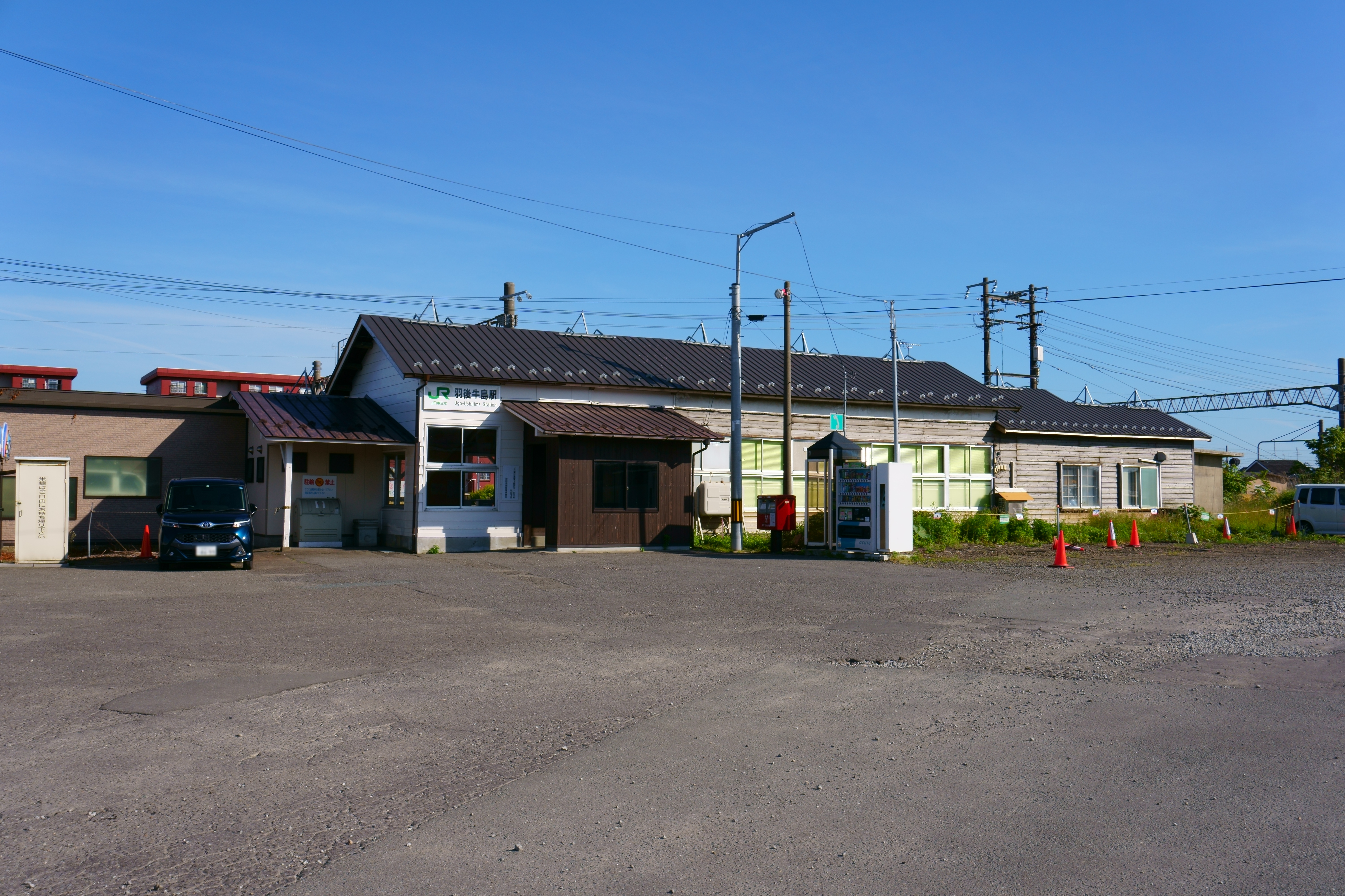 羽越本線 羽後牛島駅（秋田県秋田市）。一見駅舎のように見えるこの建物はかつての駅本屋であり、ＪＲ東日本東北総合サービス（株）秋田用地管理事務所が使用しているのみで駅舎としての機能は持たない。